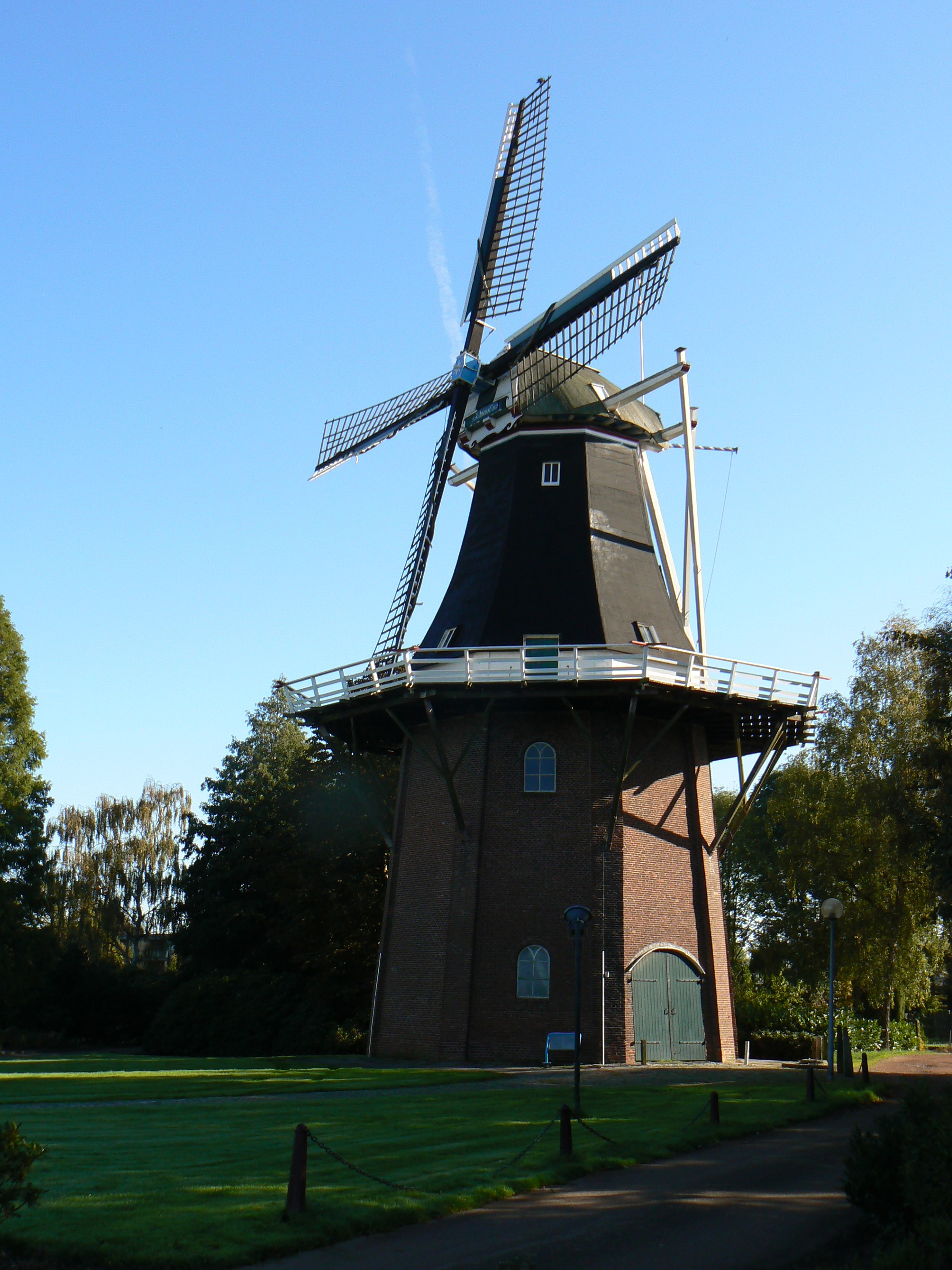 Mill "De Onrust" (1851) in Oude Pekela/The Netherlands (Koren- en Pelmolen)